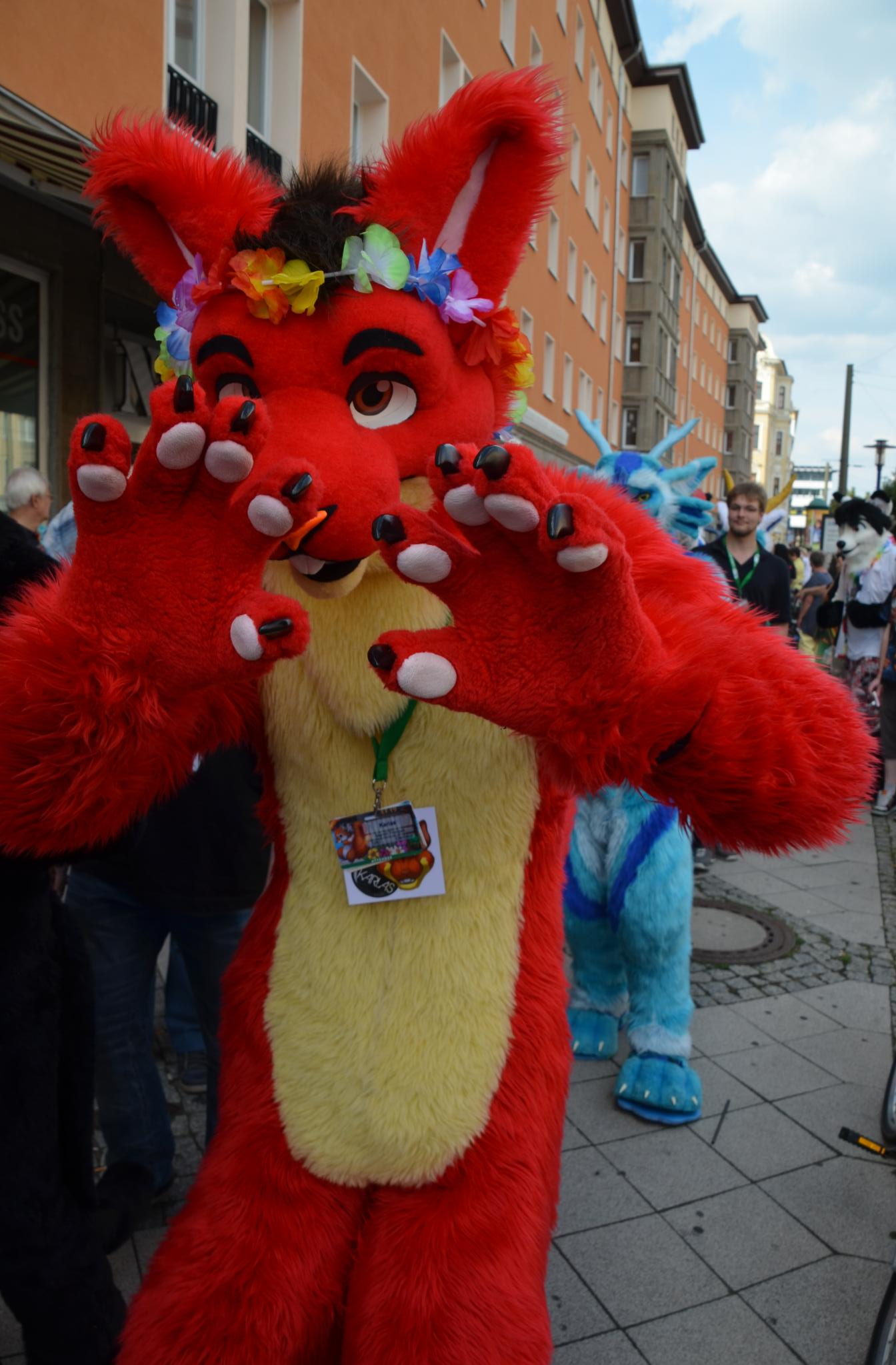 Furry Parade anläßlich der Eurofurence 19 in Magdeburg.